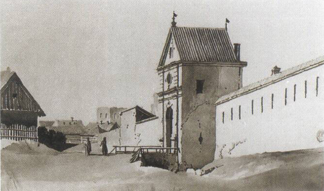 Trakai gate, Vilnius, Lithuania